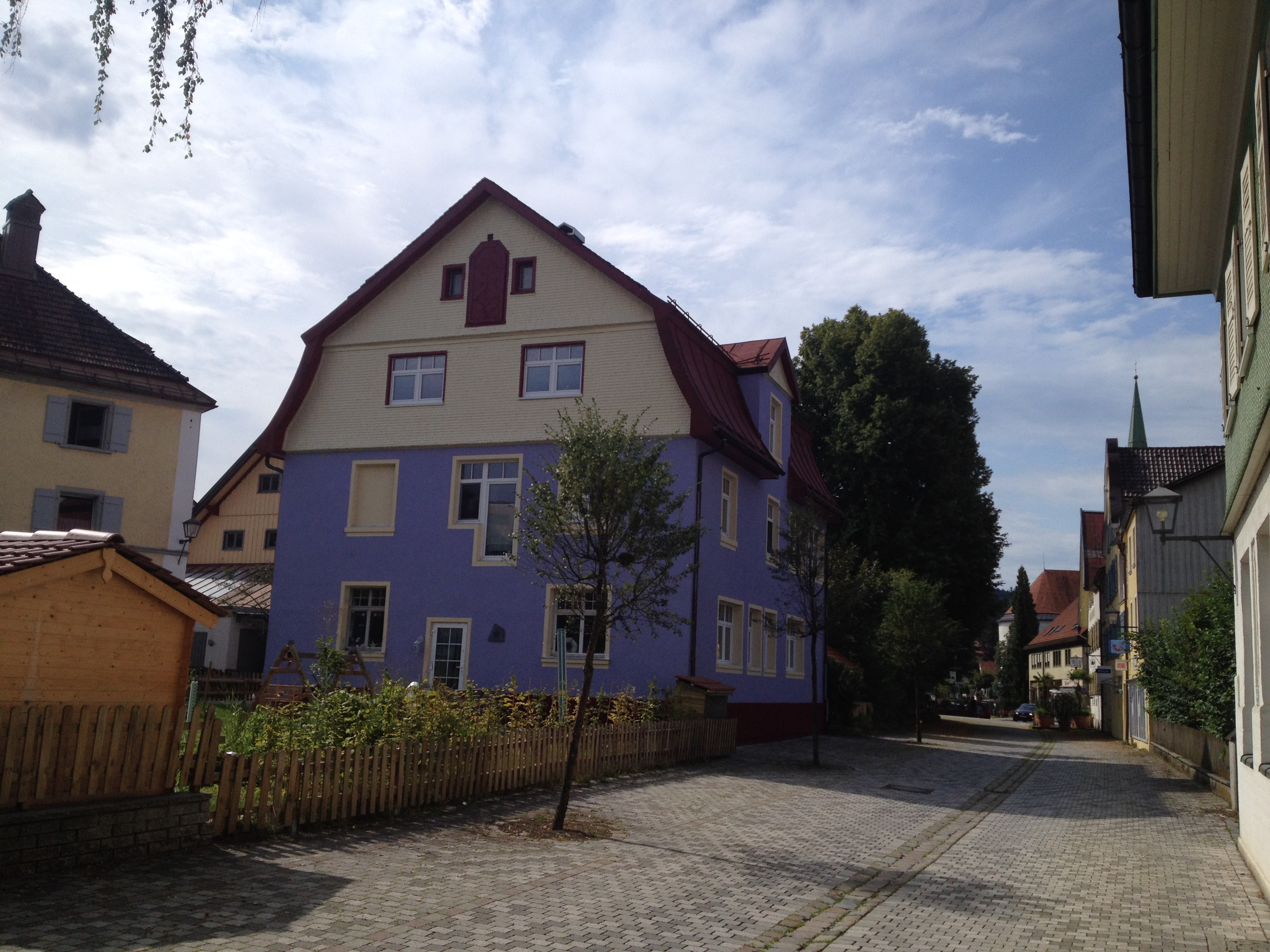 Weiler im Allgäu, Wohnhaus, erbaut um 1904 nach Plänen von Georg Bufler, zuerst Zahnatelier Herz, später Geschäftshaus Sinds